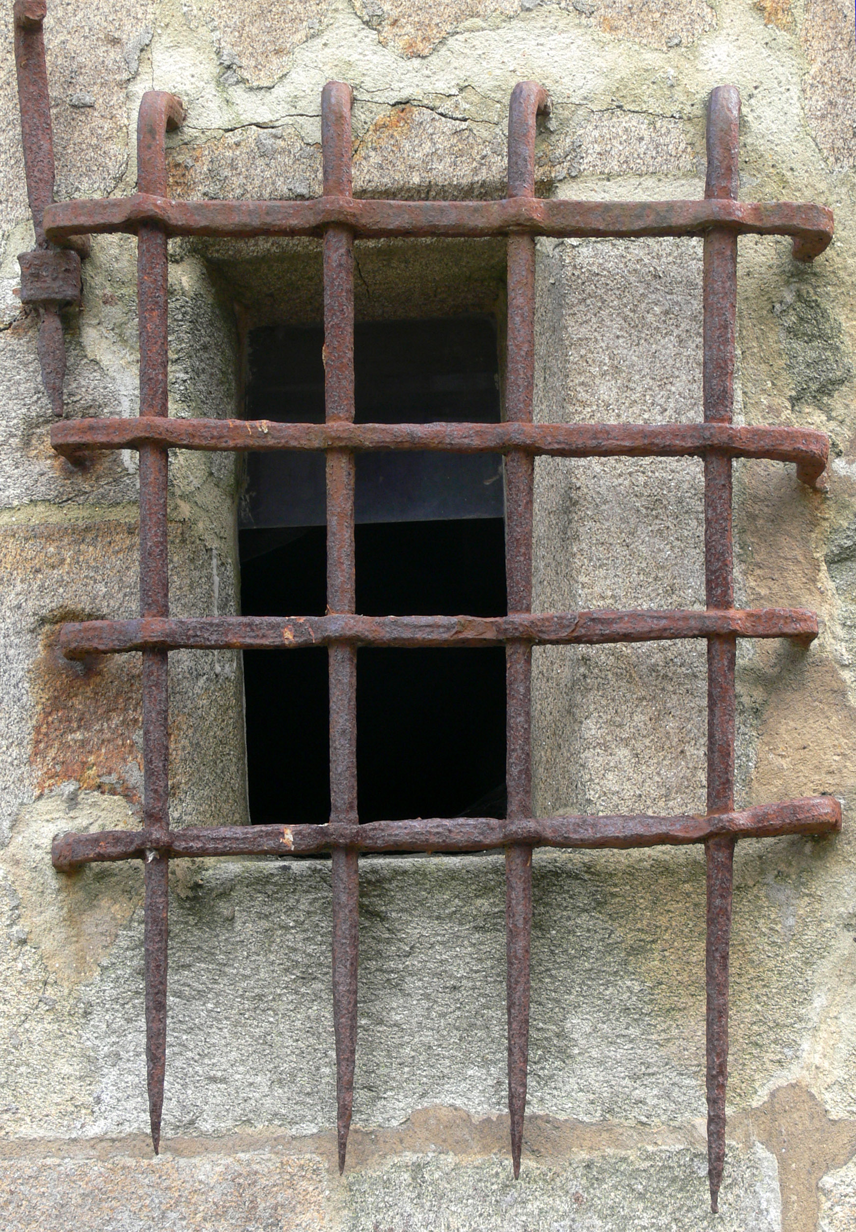 Fenêtre de l'église de Le Guerno, protégée par un fer forgé ancien (Morbihan, Bretagne sud, France)